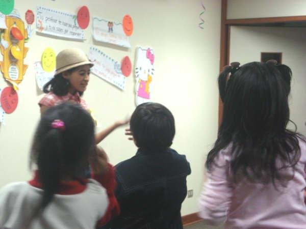 Cynthia Salas Tairaku (estudiante de psicología) brindando un taller de psicología educativa a estudiantes de primaria en la Facultad de Psicología de la Universidad Nacional Mayor de San Marcos (Lima, Perú).